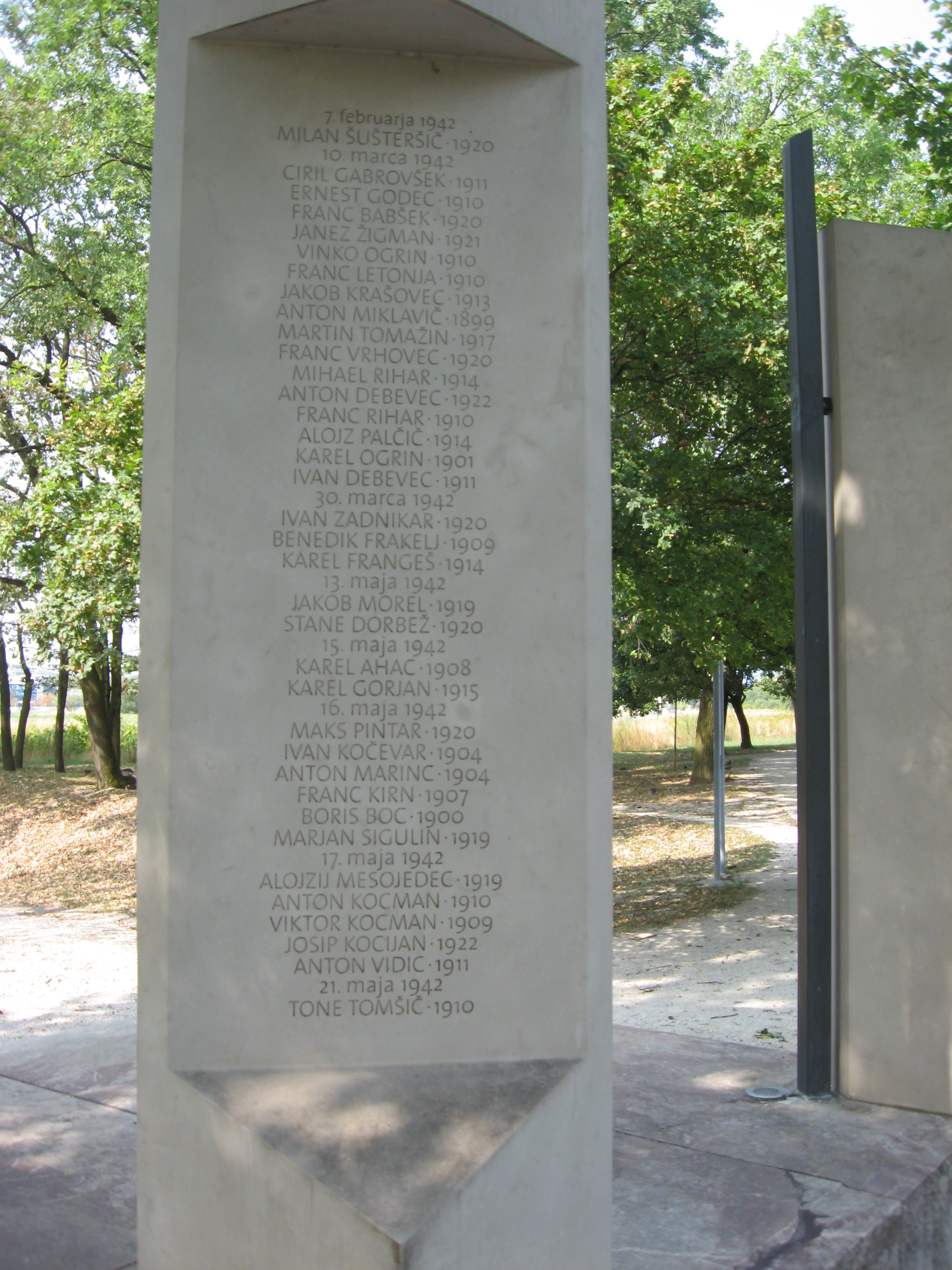 Dettaglio del monumento presso Gramozna jama (Ljubljana), ideato nel 1957 da architetto sloveno Vinko Glanz, morto il 20.2.1977, con scolpiti i nomi degli ostaggi fucilati a Lubiana, per rappresaglia senza regolare processo, da militari dell'Esercito Italiano nella primavera del 1942, durante la seconda guerra mondiale.